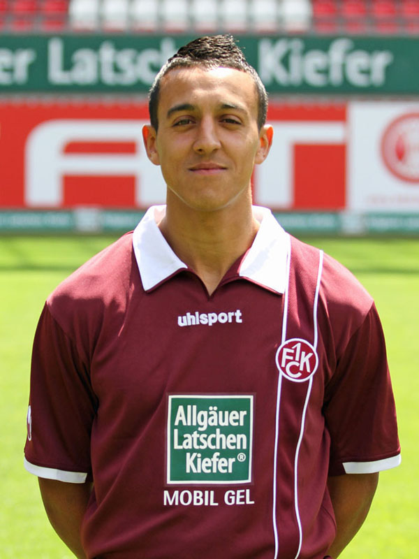 Chadli Amri, Fußballspieler